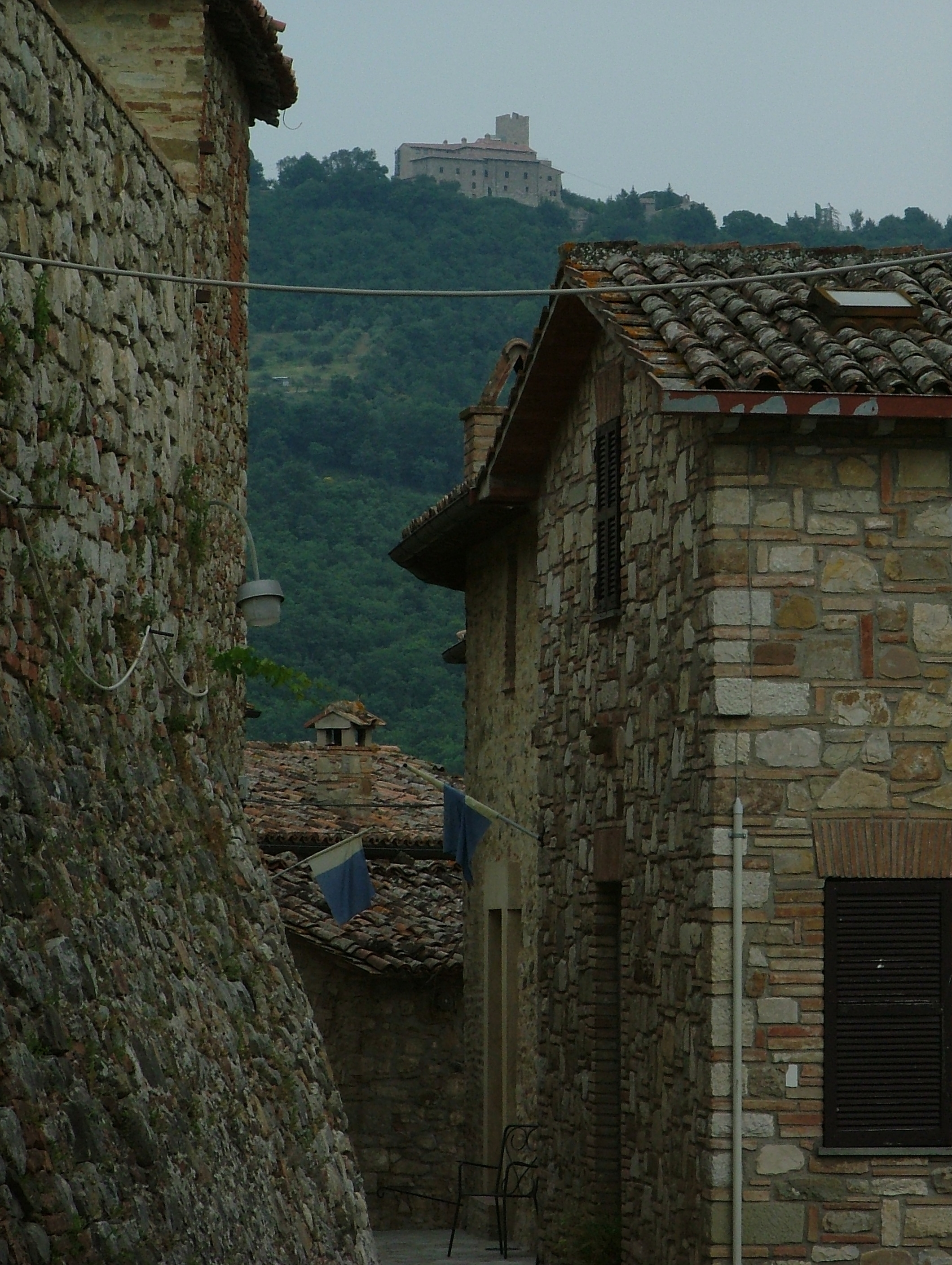 Castello di Poggio Aquilone, con veduta sul Castello di Civitella dei Conti - SanVenanzo (TR)che sovrasta su di esso. Entrambi antichi feudi dei Conti di Marsciano